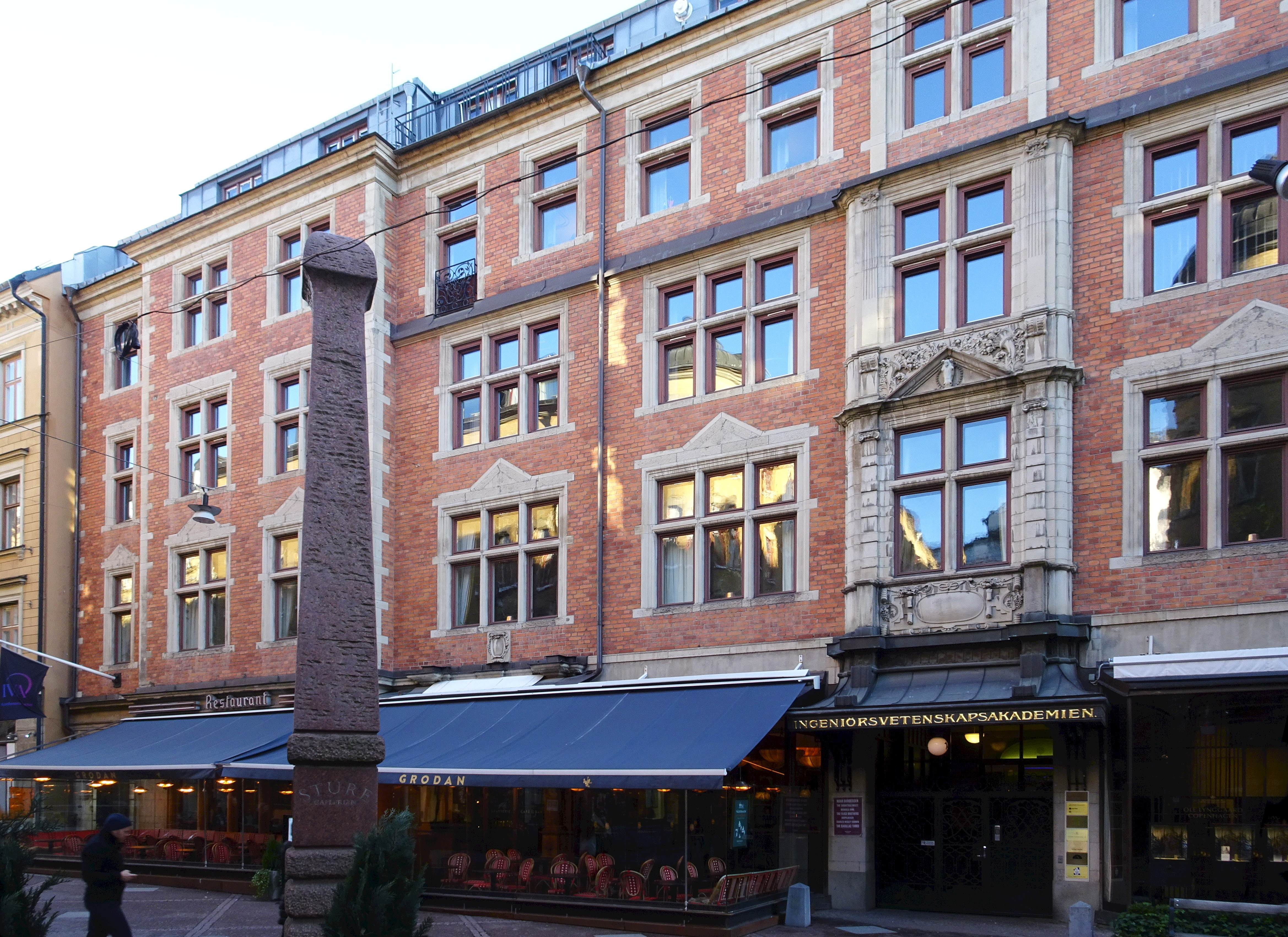 Fastigheten Riddaren 10, Grev Turegatan 12-16, Nybyggnadsår 1896 - 1899, Salin Kasper & Lindgren G. (Arkitekt) Stockholms Tattersall (Byggherre)